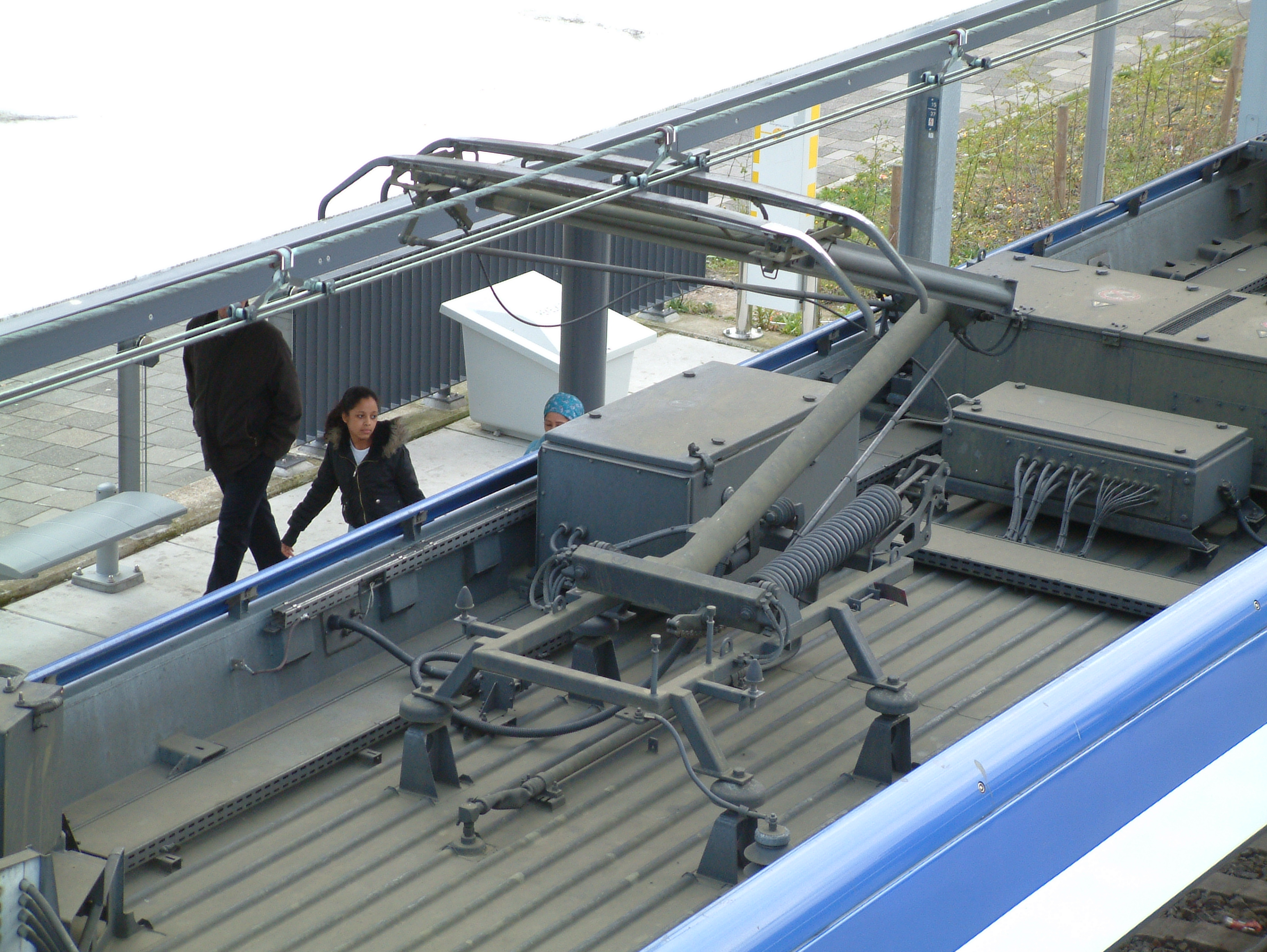 Pantograaf van een RandstadRail voertuig